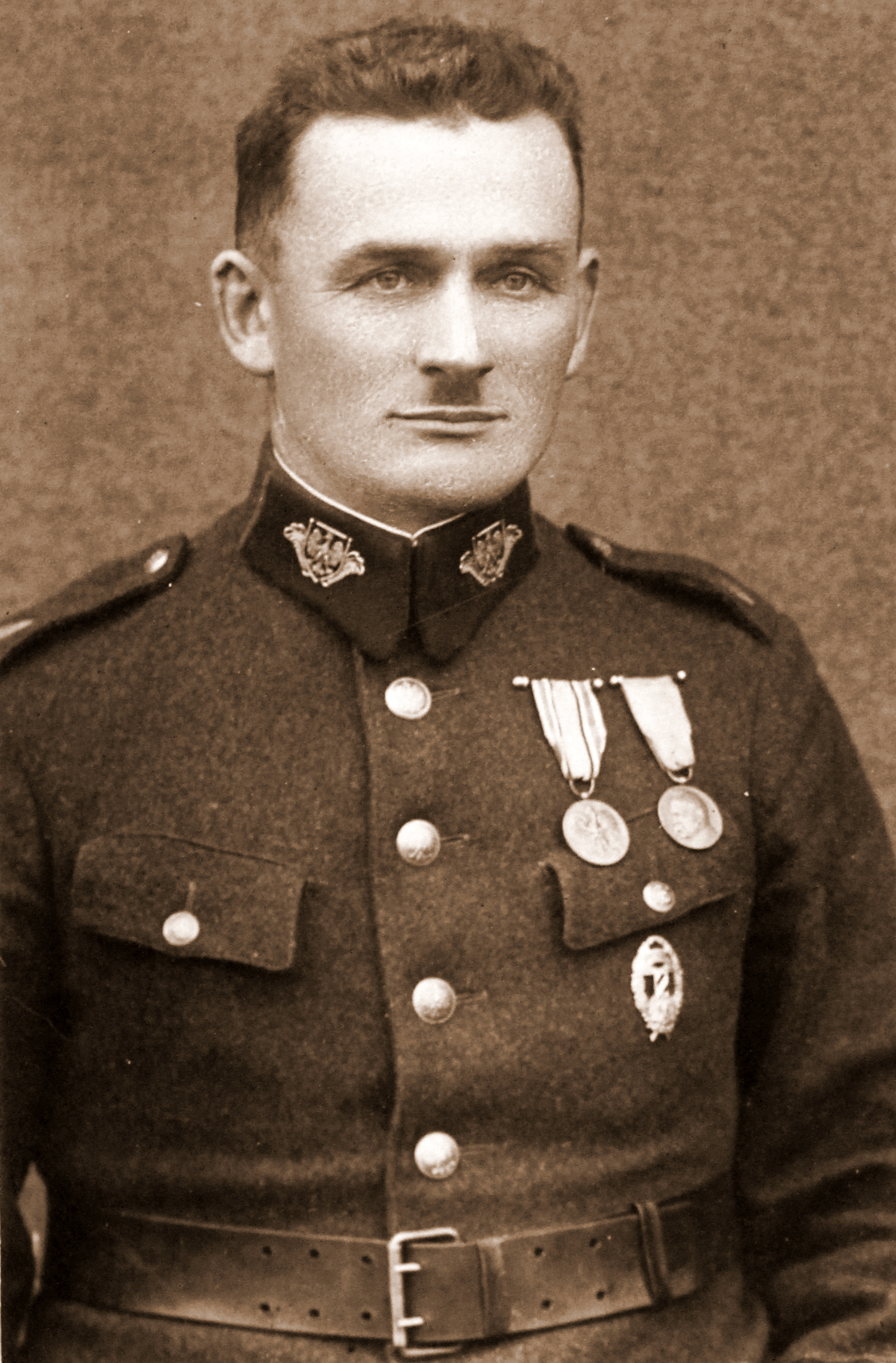 starszy strażnik Idzi Mikulski- kierownik placówki SG Rychtal II